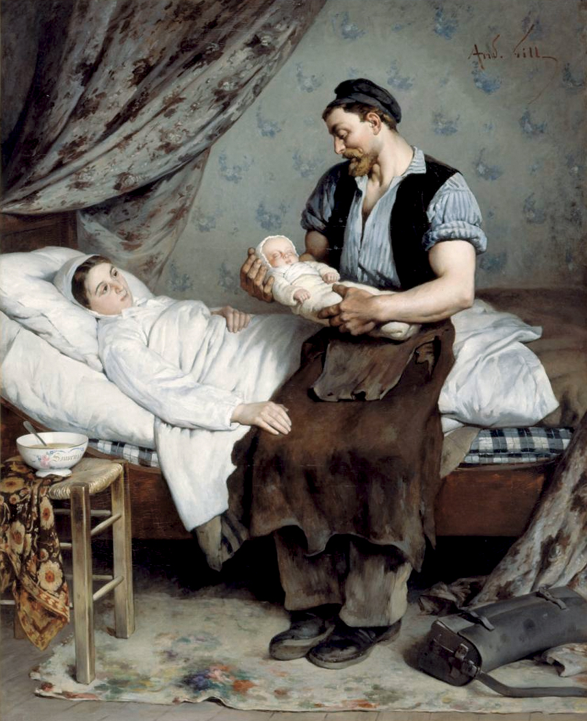 Peinture à l'huile.